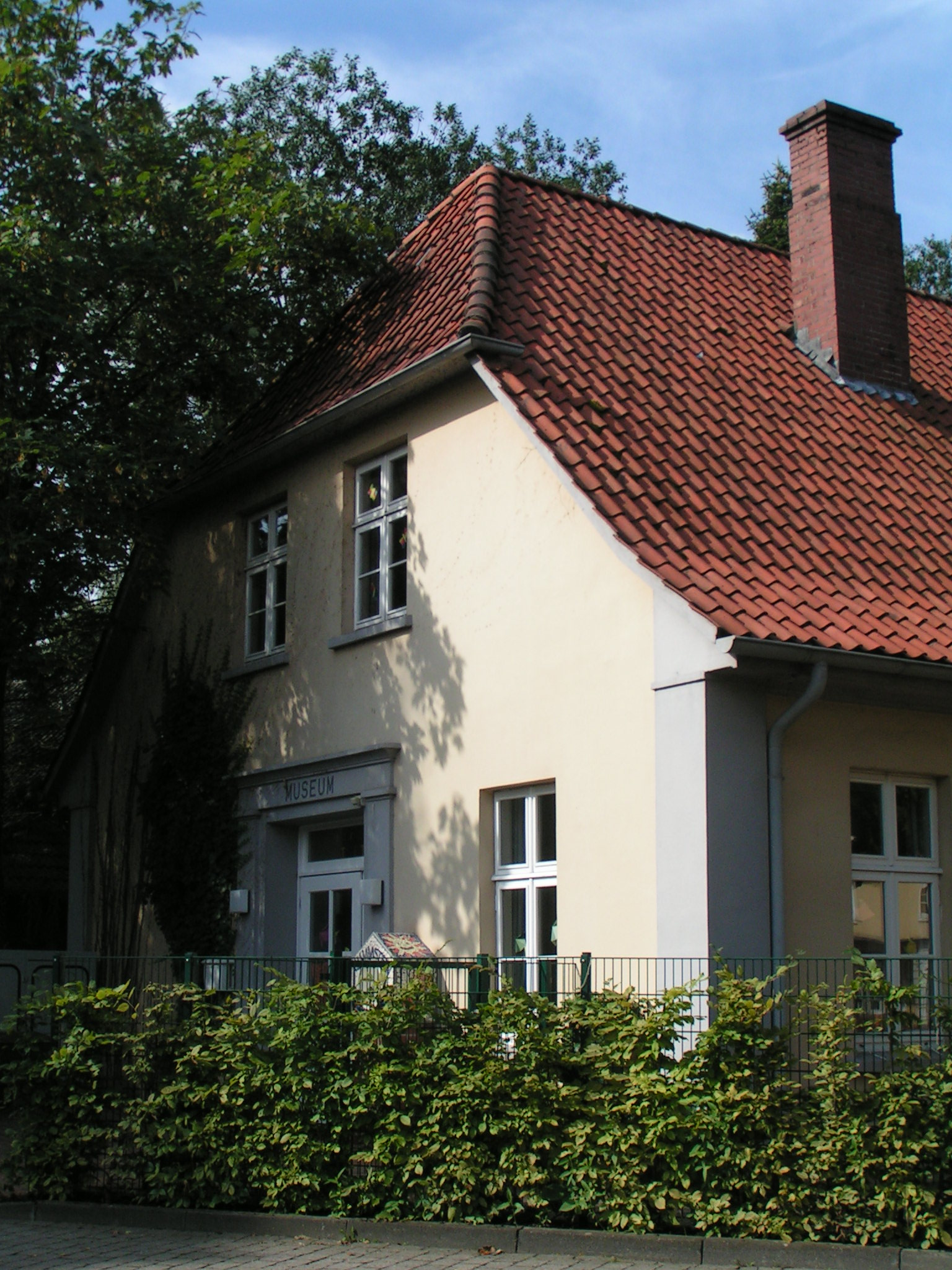 Alter Standort des Industrie Museums Lohne; heute Außenstelle des Kindergartens St. Gertrud